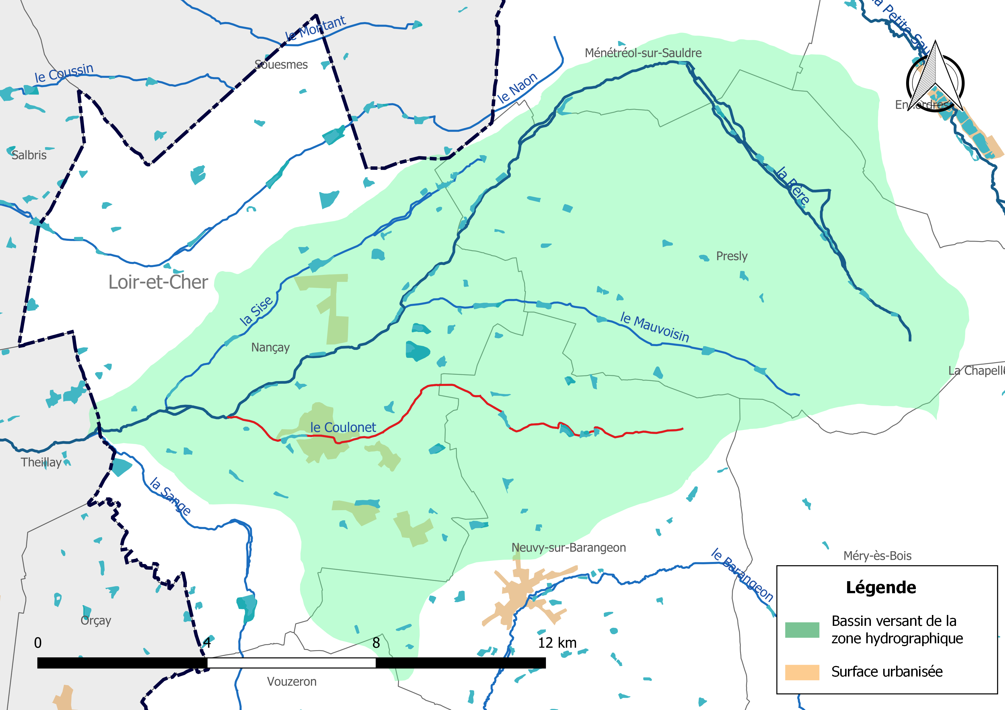 Carte du cours d'eau « le Coulonet » (France) et de la zone hydrographique dans laquelle il s'insère.